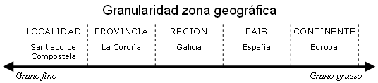 Ejemplo de granularidad de la dimensión 'Zona Geográfica', se muestra la jerarquía localidad, provincia, región, país, continente.